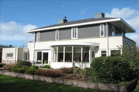 Afbeelding van de wijk Vogelhorst in Almere